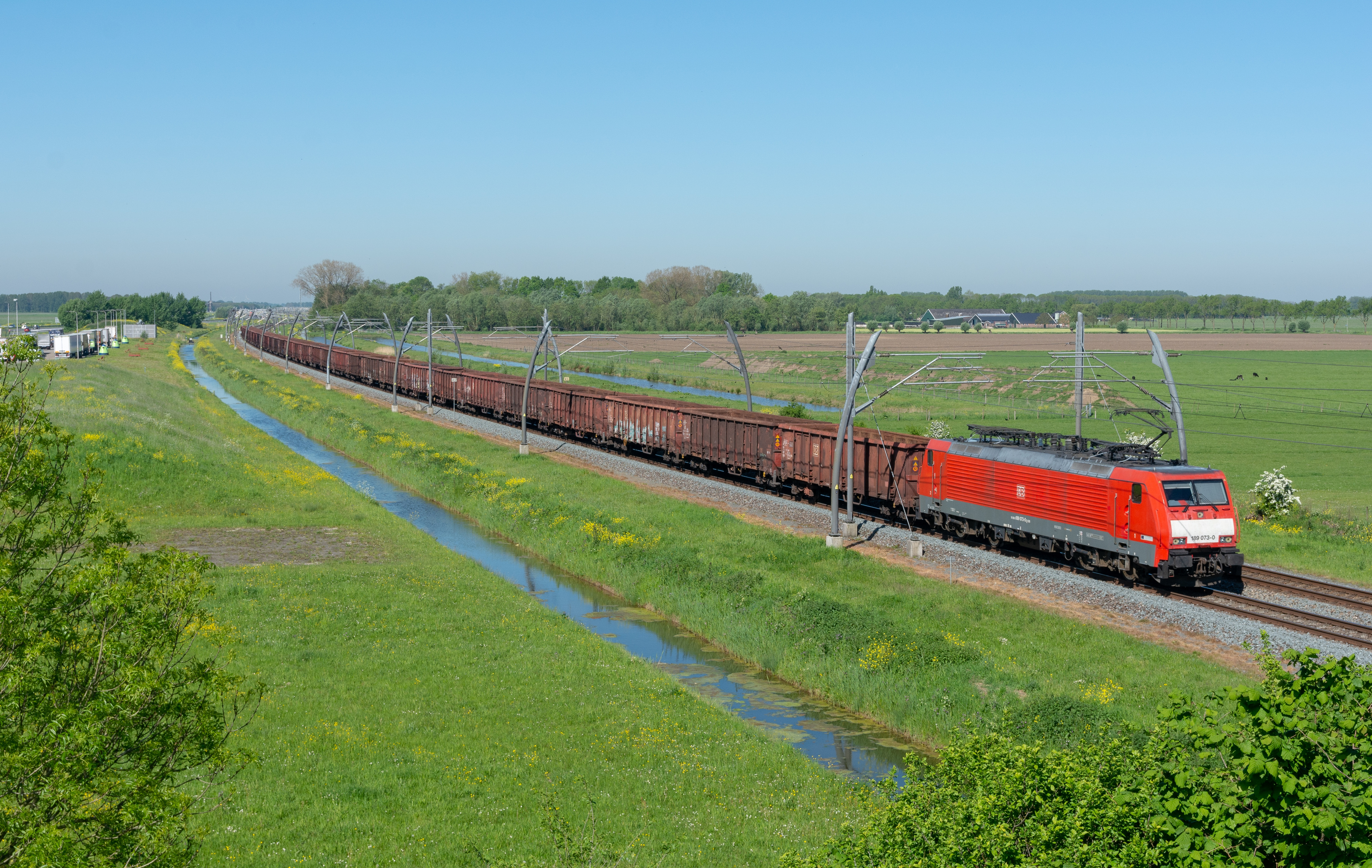 Ter hoogte Neerrijnen op de Betuweroute rijdt DBC 189 073 met Eanos schrootwagens in de richting van Duitsland. Deze wagens worden regelmatig gebruikt voor containers, die er ingezet worden.